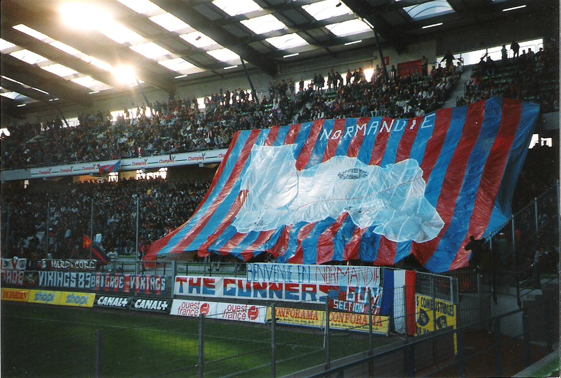 voile déployée par les Gunners lors du match Caen Le Havre du 20 mai 1995